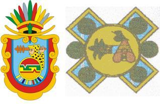 En esta imagen están primeramente el logotipo del estado de Guerrero y junto el logotipo de Tlapa de Comonfort, Gro.